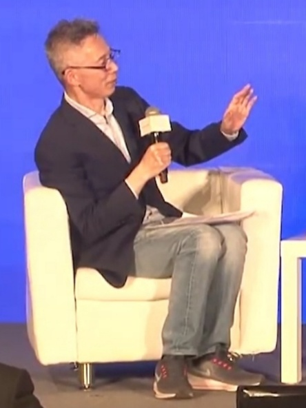 中文（中国大陆）: 主持人蒋昌建